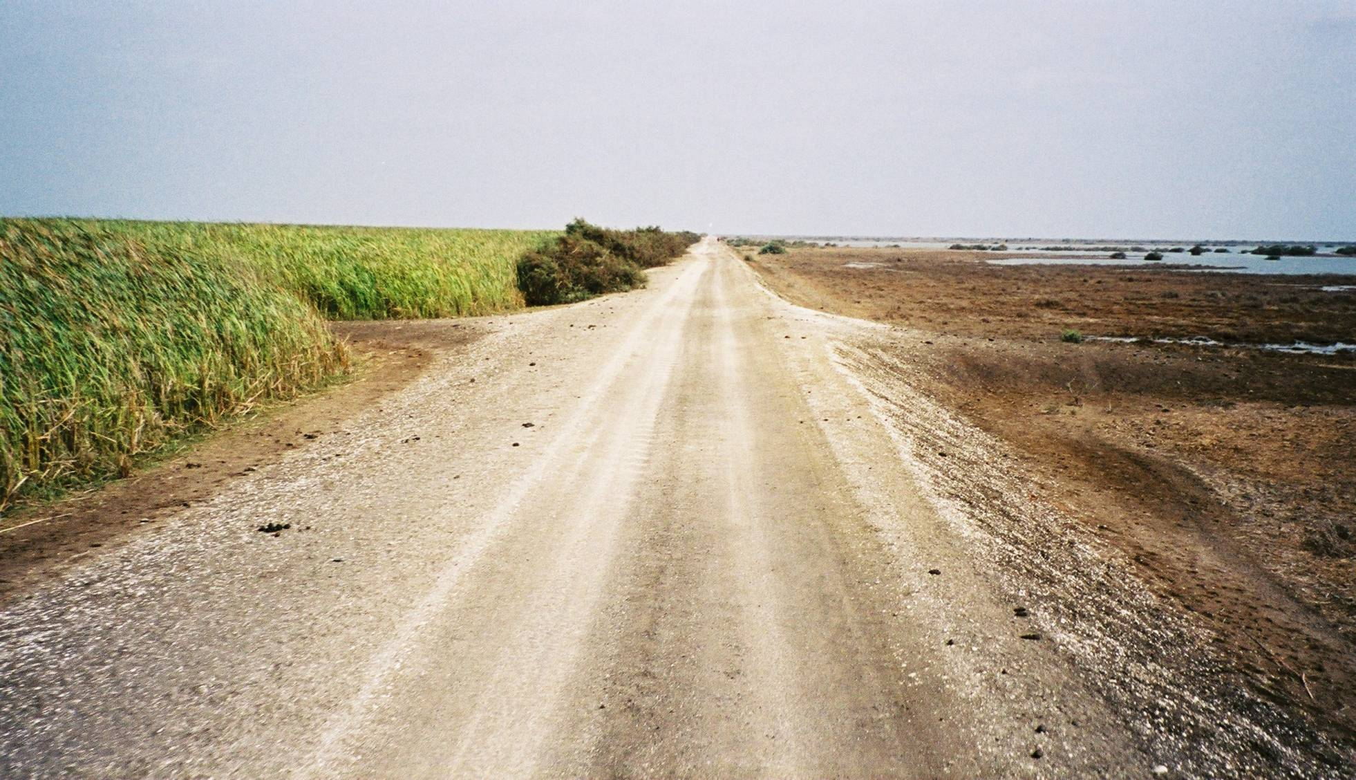 Digue le long du fleuve Senegal, côté Mauritanie